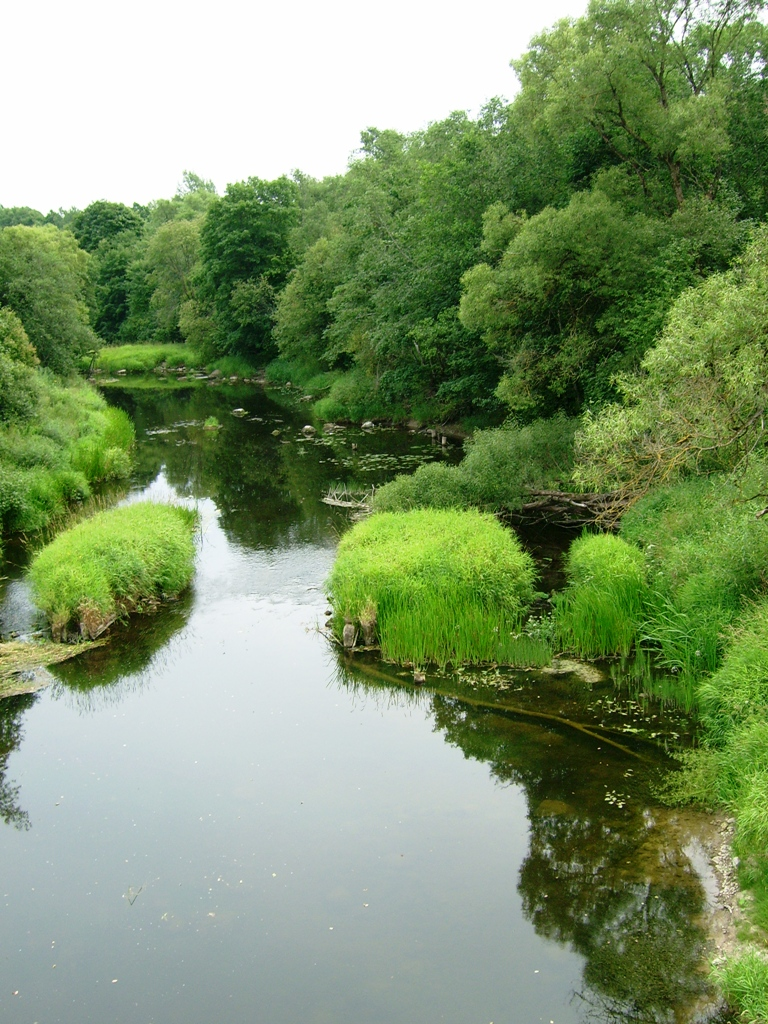 Jūra ties Kvėdarna